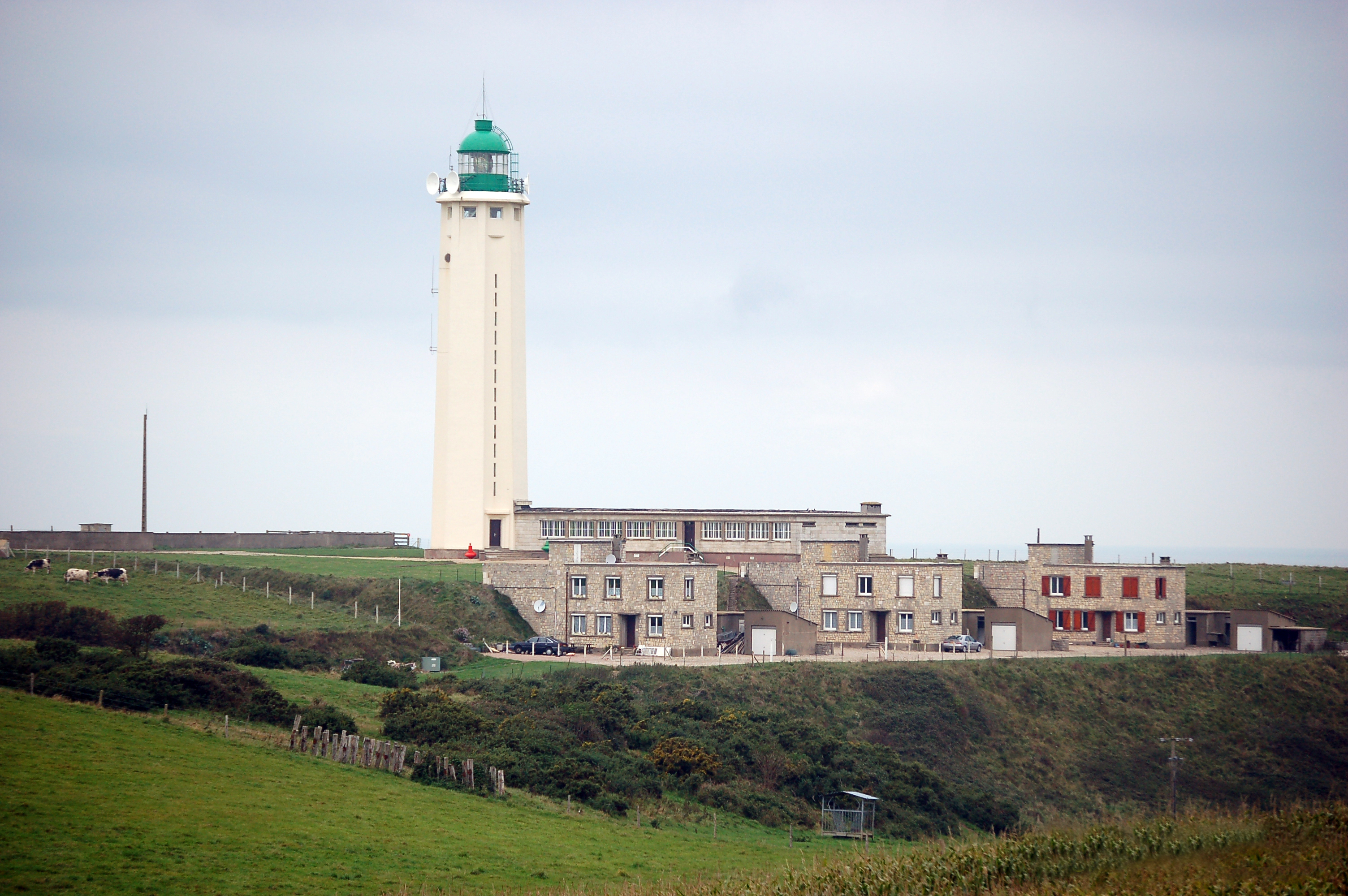 photo du phare prise depuis la terre.